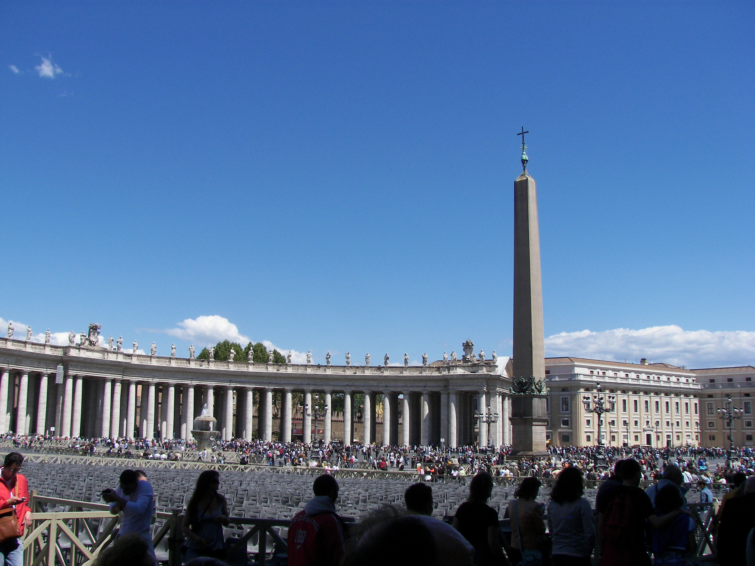 Piazza San Pietro in Vaticano.